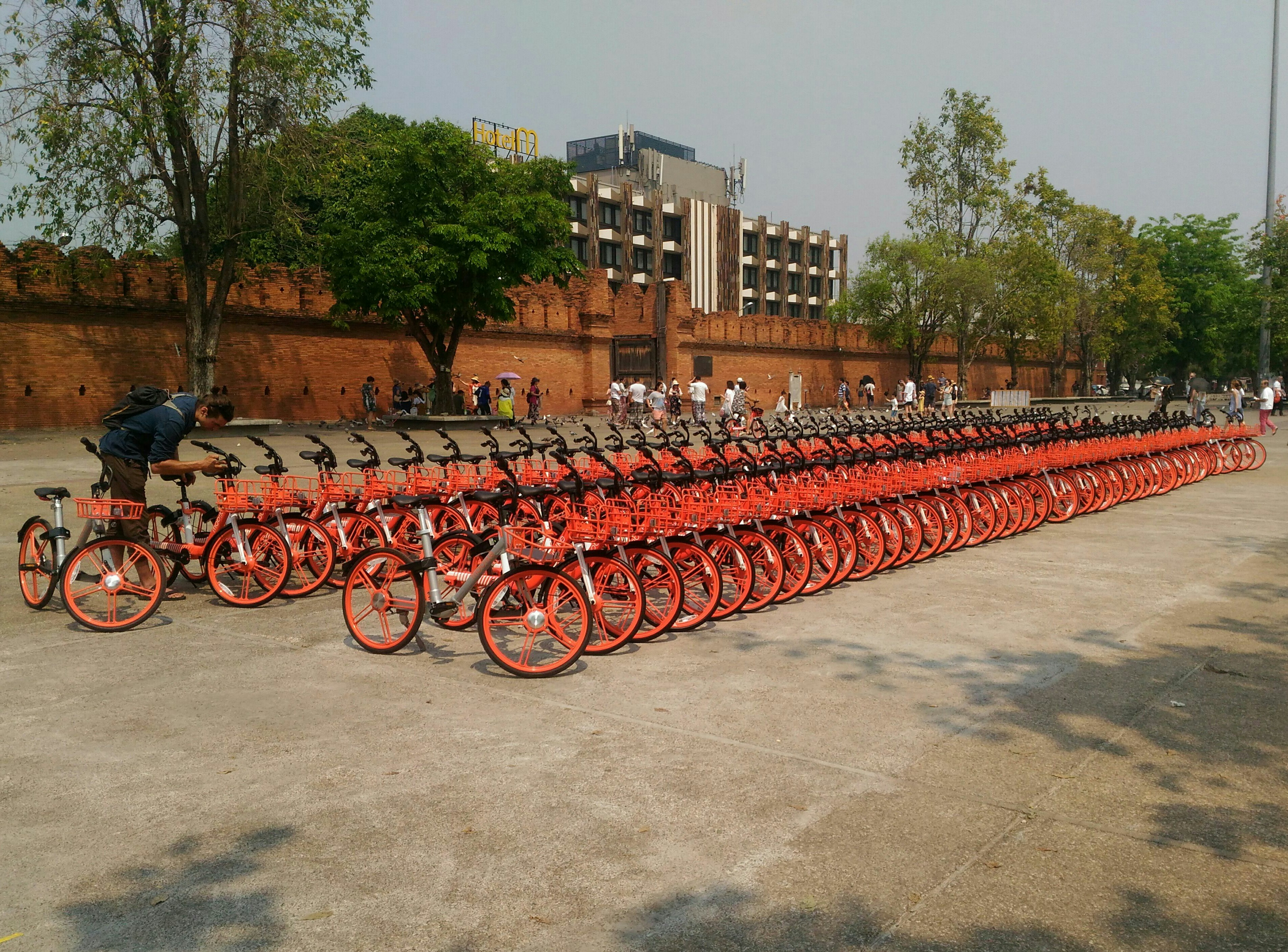 De Chinese leverancier/exploitant plaatst sinds begin 2018 met enige regelmaat zo'n 100 nieuwe fietsen op een centrale plek (Tha Phae Gate in dit geval).